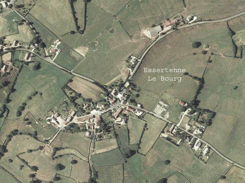 Auteur : THIERY Benoit Origine : Collection personnelle Description : Vue aérienne du bourg de la commune d'Essertenne 71510